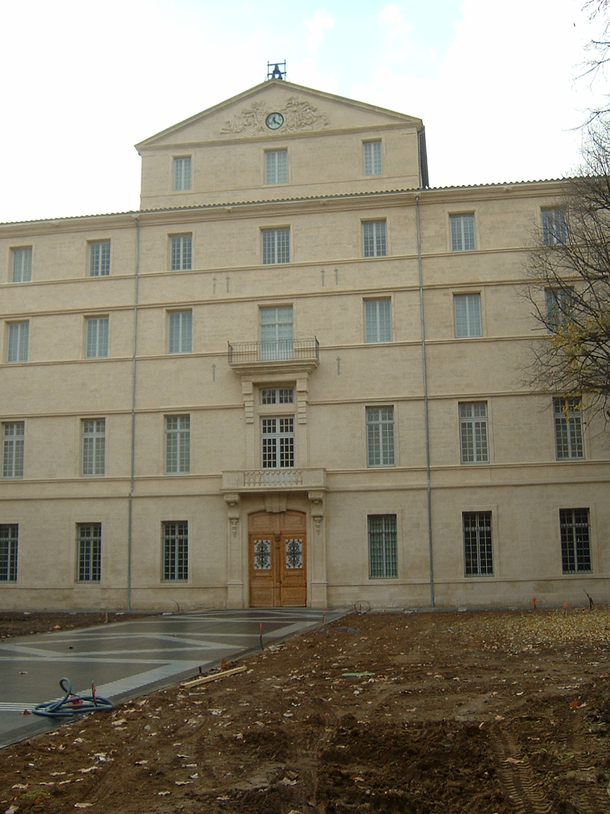 Le musée Fabre de Montpellier (Hérault). L'allée devant l'entrée comprend des bandes noires et blanches réalisées par l'artiste Daniel Buren.